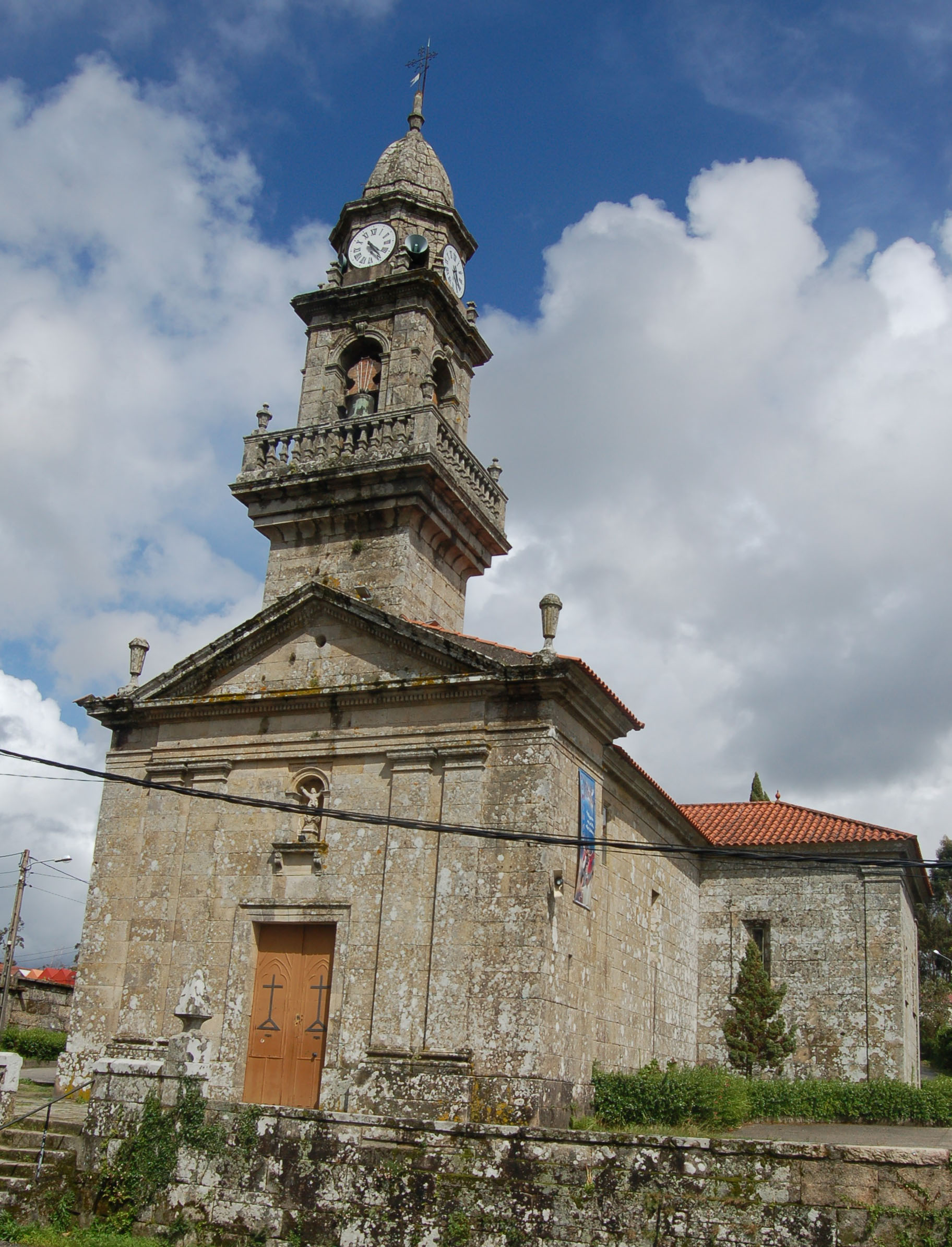 Igrexa de Santa María de Mourente (Pontevedra)